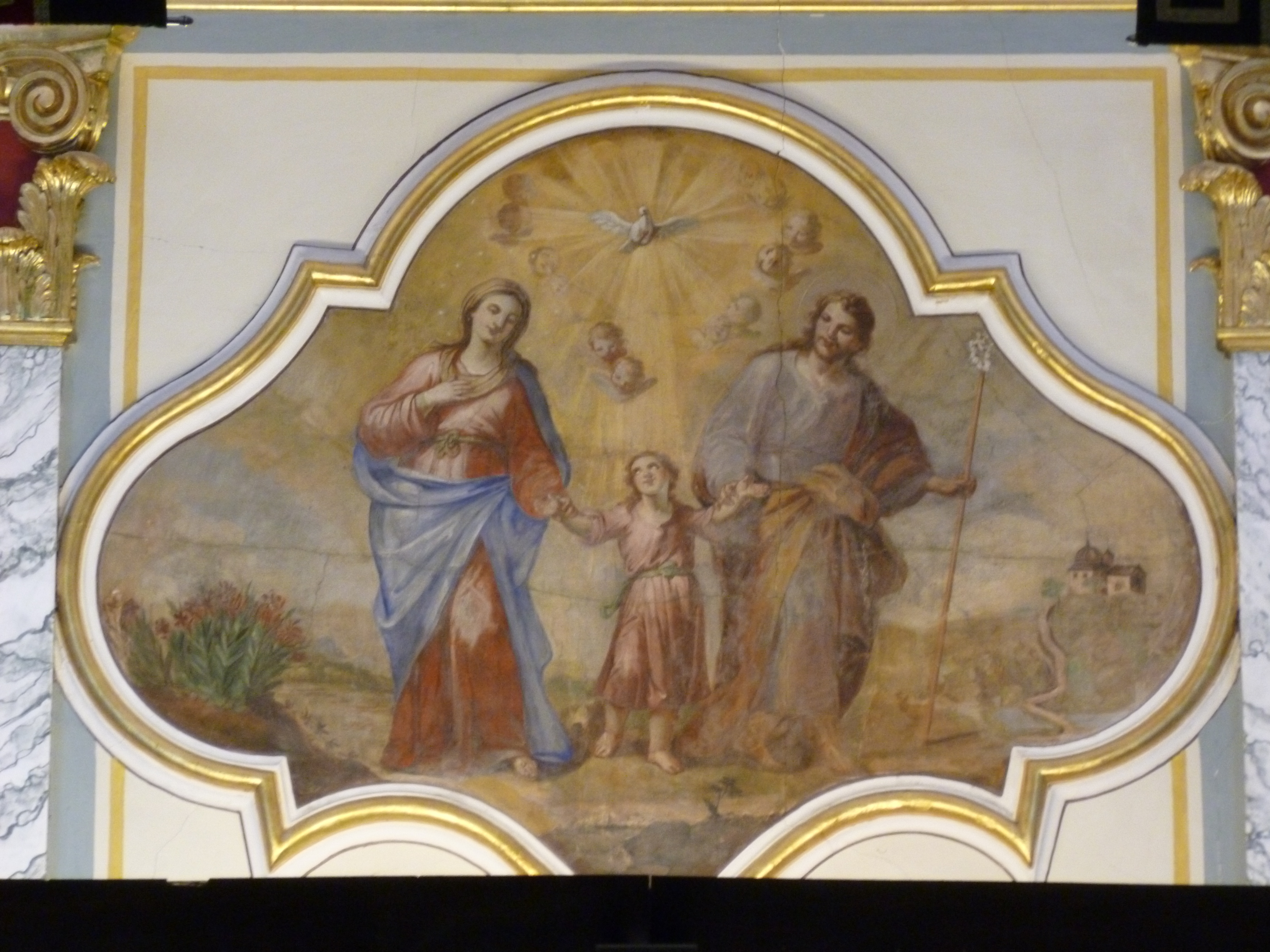 La Sagrada Família (ca. 1769), de Josep Vergara Ximeno. Dalt de la porta principal, a l'església del Sant Àngel Custodi de la Vall d'Uixó (Plana Baixa)